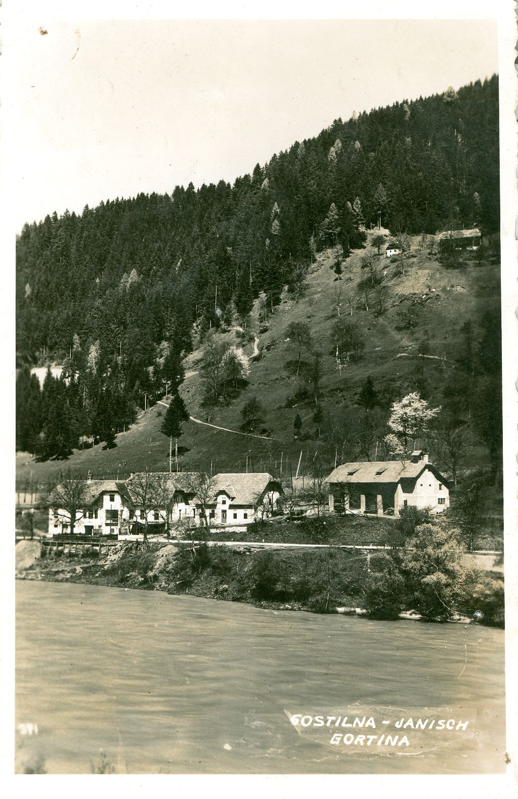 Razglednica Gortine.